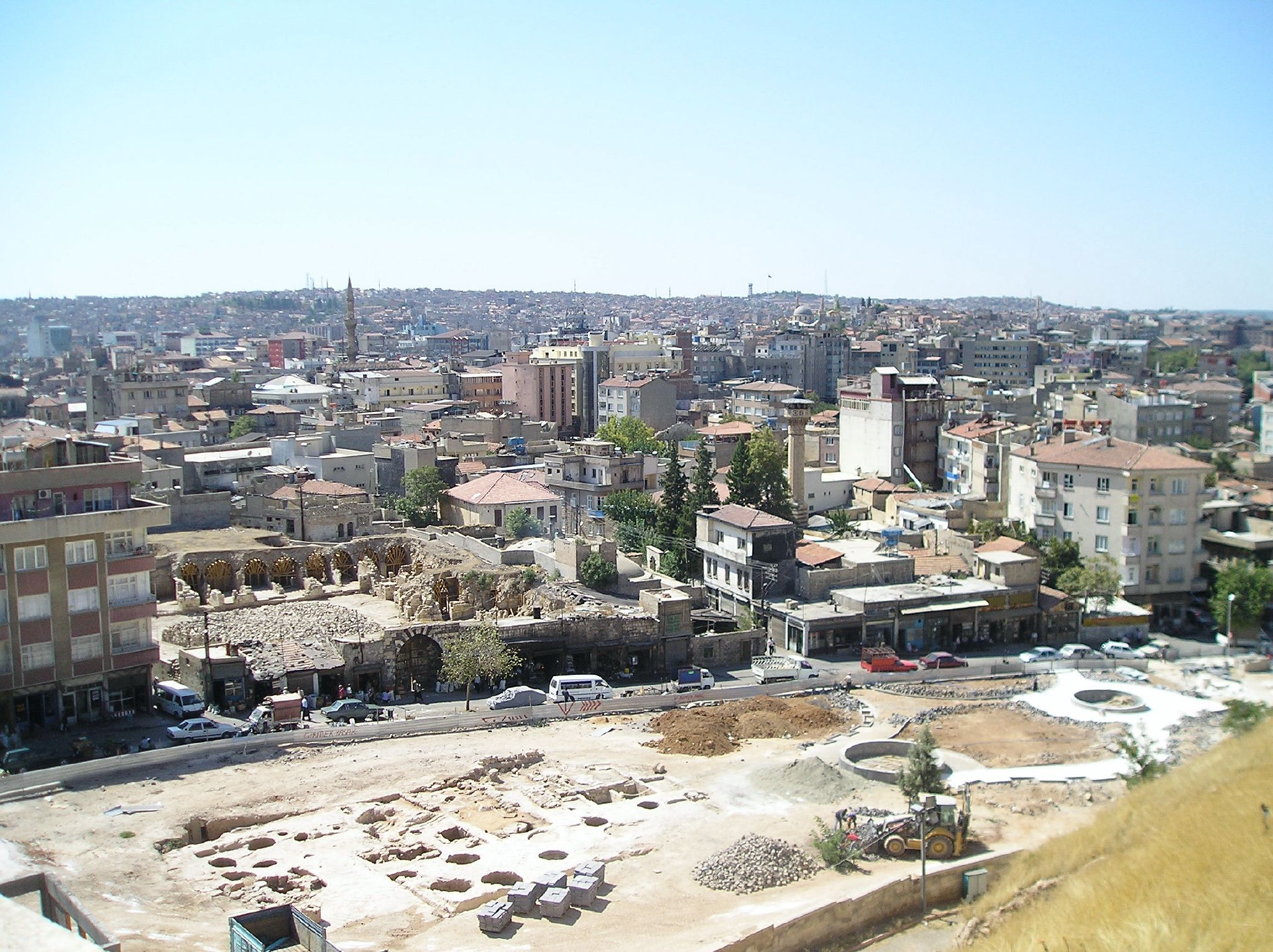 Gaziantep